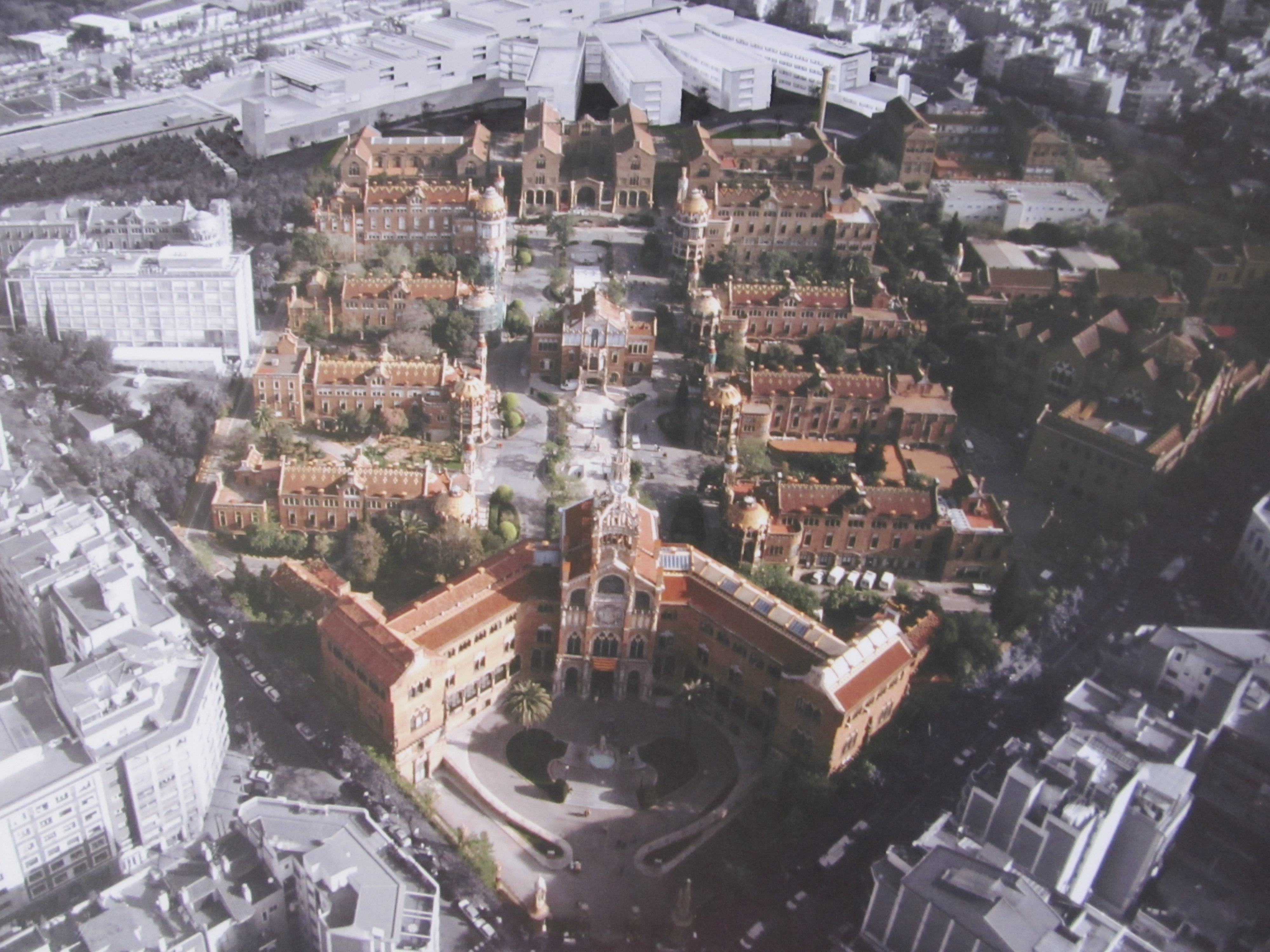 План госпиталя Сан-Пау, Барселона